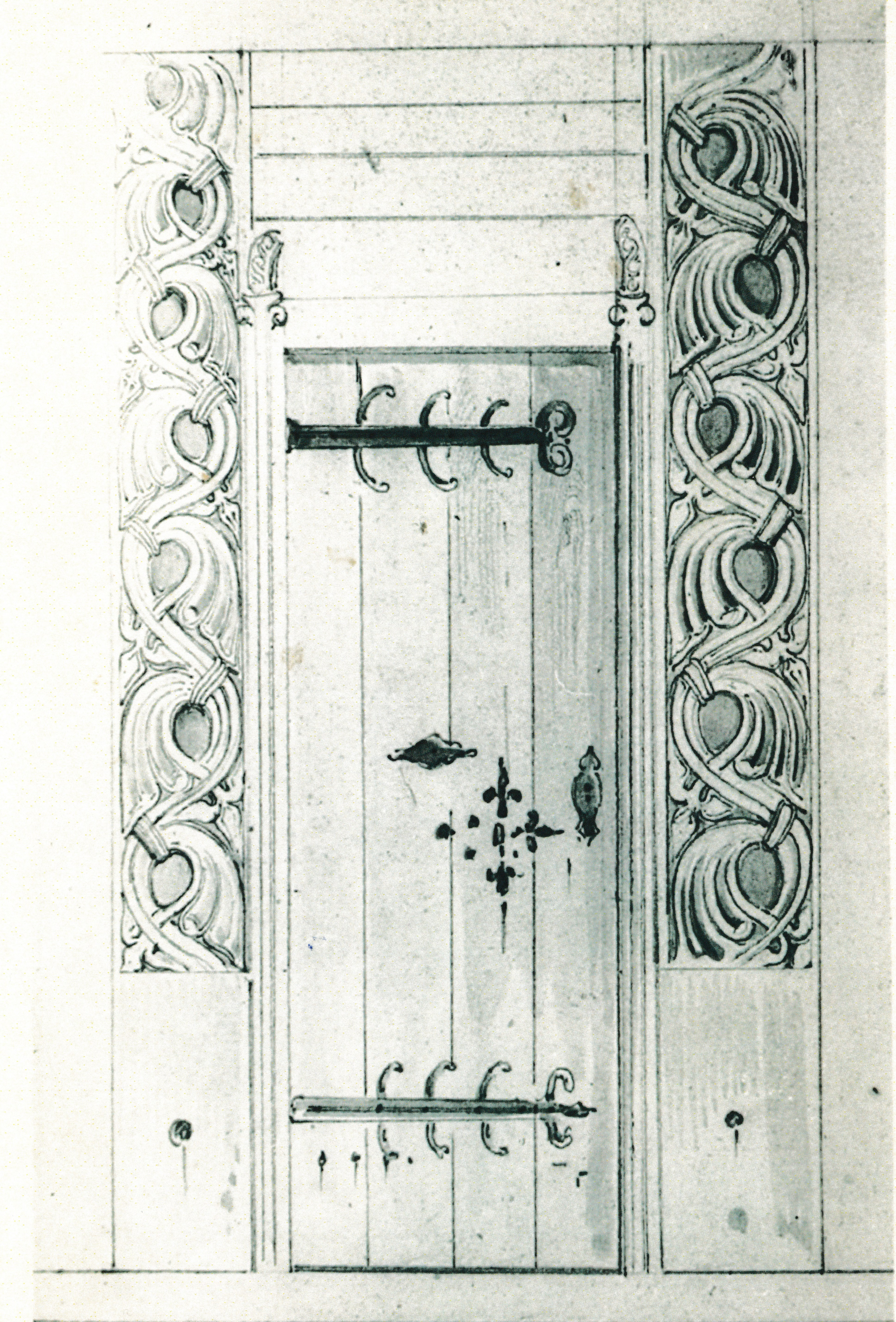 Inngangsparti med portal, Gåra stavkirke, Tegning av F. W. Schiertz.